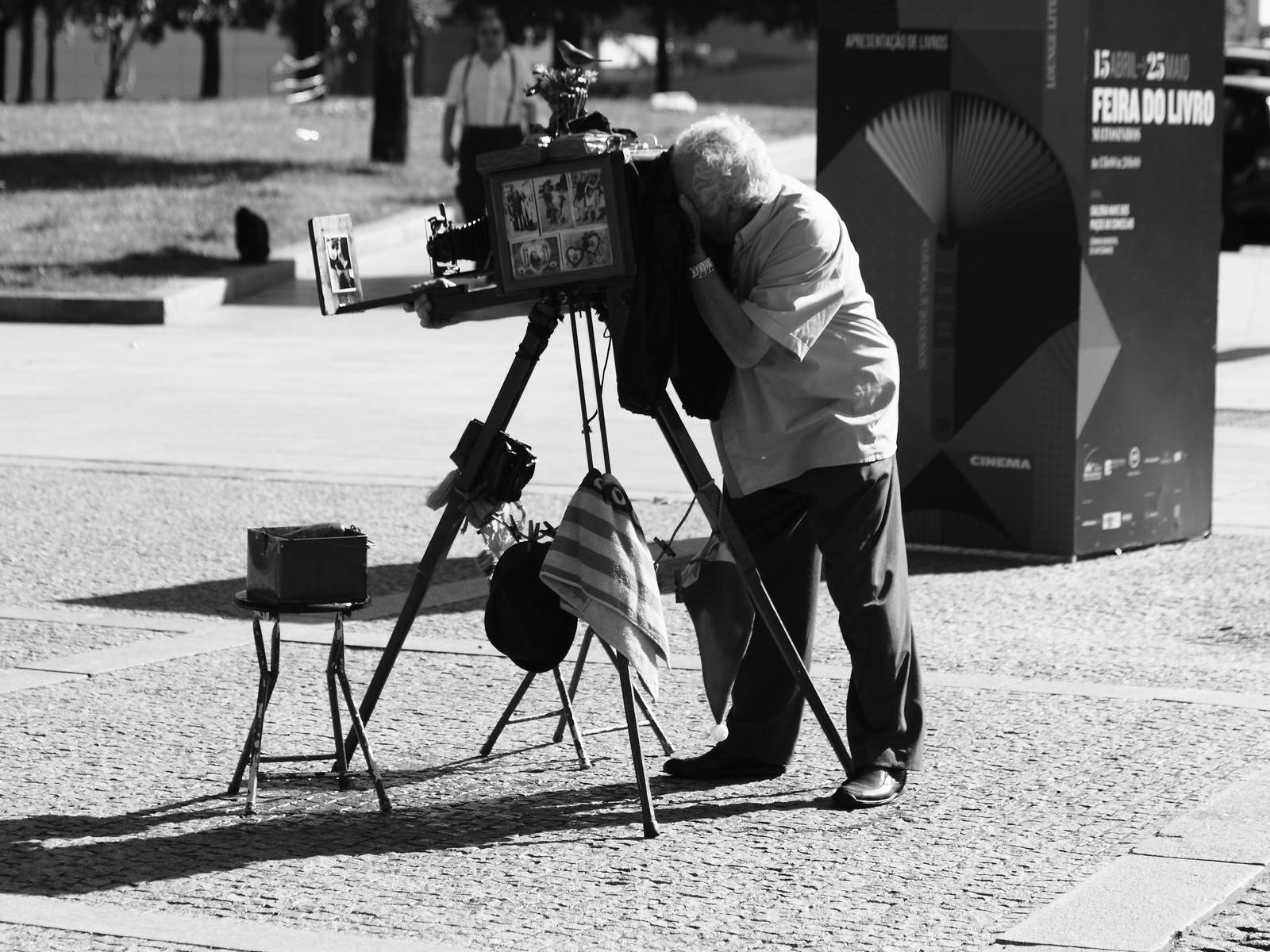 Última Geração